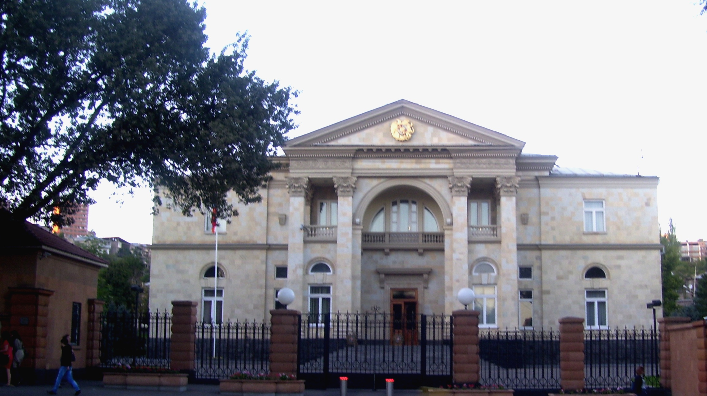 ՀՀ Նախագահի նստավայր, 1958 թ., Մարշալ Բաղրամյան պող. 26, Ճարտ.` Մ. Գրիգորյան, նախկինում` Գերագույն խորհրդի նախագահության վարչական շենք 6/162